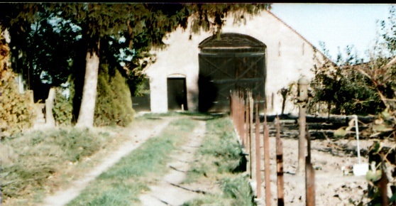 Cifracsűr, Vállaj (Szabolcs-Szatmár-Bereg)